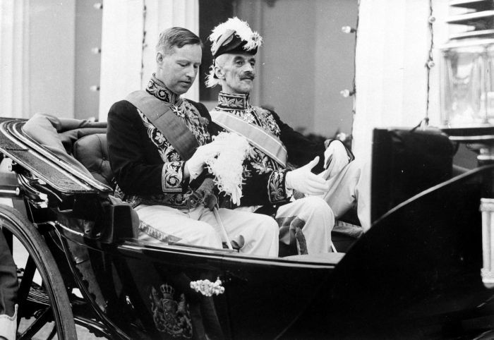 Repronegatief. De nieuwe Gouverneur-Generaal Tjarda van Starkenborgh Stachouwer verlaat samen met de zojuist afgetreden G.G. B.C. de Jonge het gebouw van de Volksraad, waar de bestuursoverdracht plaatsvond